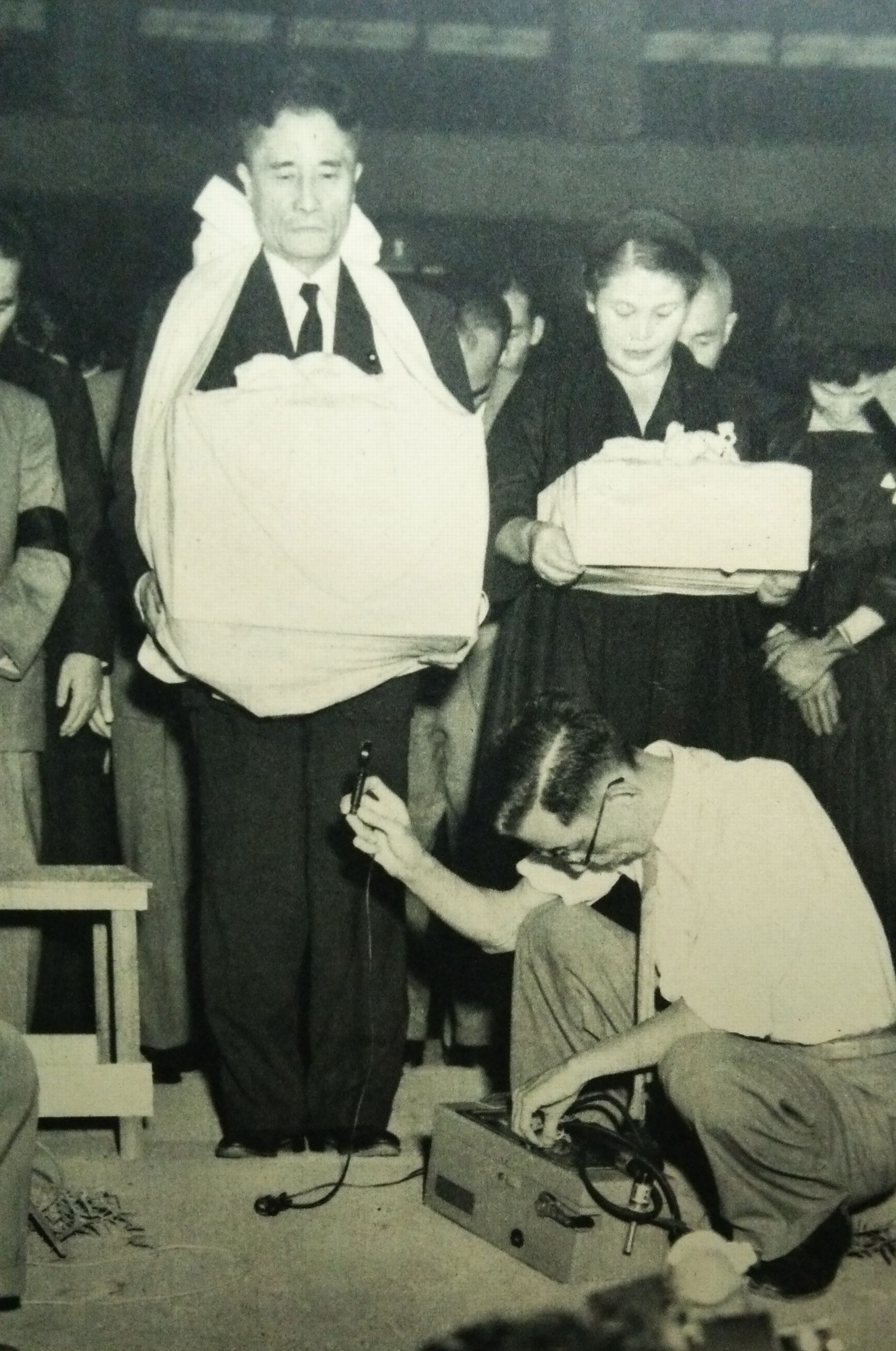 徳田球一の遺骨を抱いて北京から羽田空港へ戻った志賀義雄（左）と徳田たつ（右）